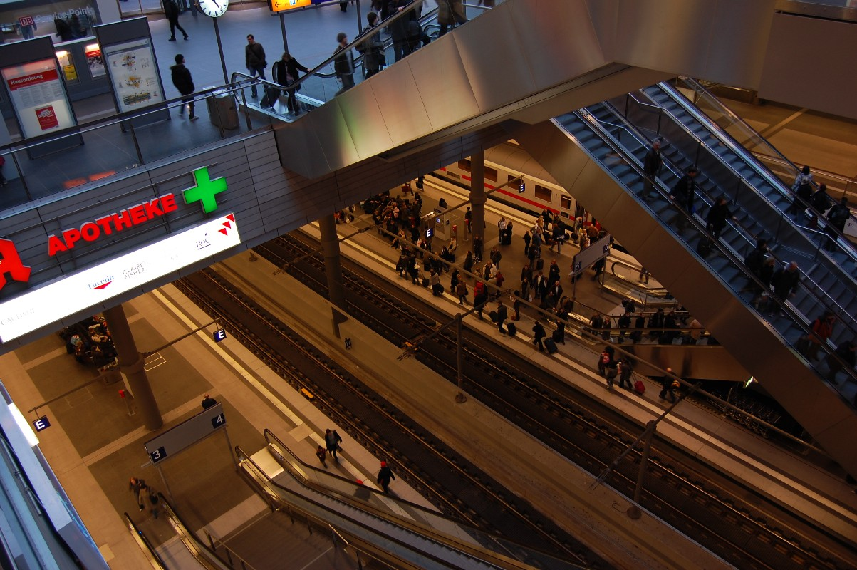 Berlin Hauptbahnhof levels